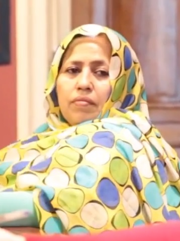 Miren Gorrotxategi, Conchi Palencia y Josetxo Arrieta, senadoras y senador de Unidos Podemos por Euskadi, se han reunido hoy con Jira Bulahi, delegada nacional del Frente Polisario en España, para abordar diversas cuestiones